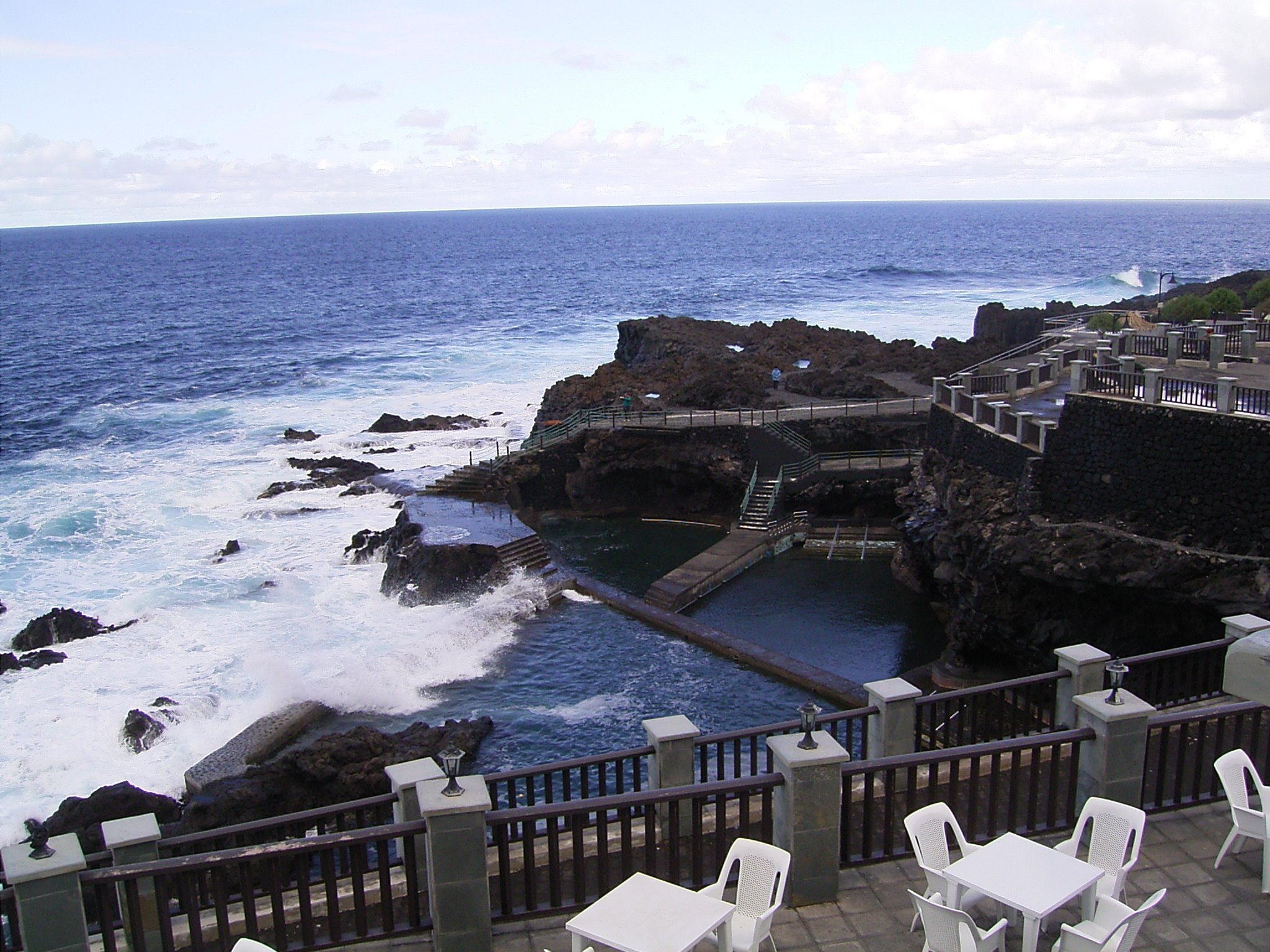 Piscinas de Fajana at La Fajana in Barlovento, La Palma, Canary Islands